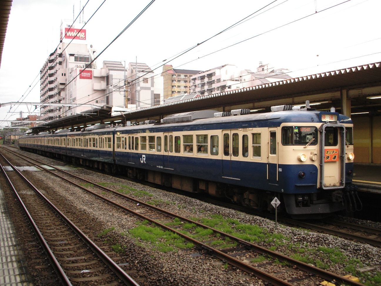 115系ホリデー快速鎌倉西国分寺にて。